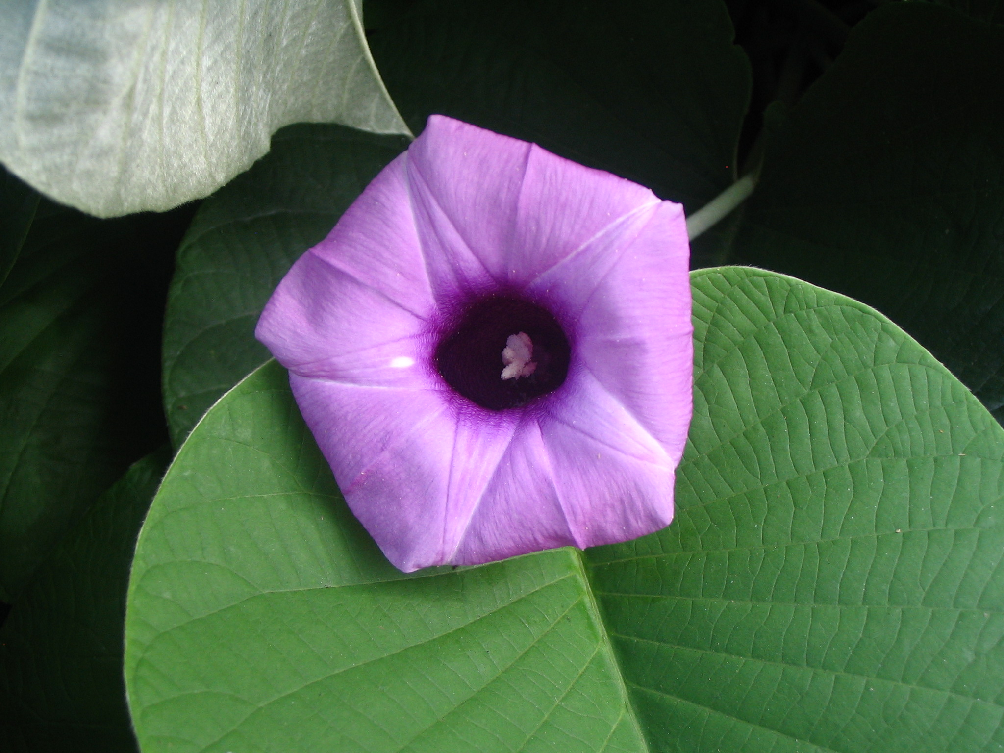 Argyreia nervosa - Kuala Lumpur - Malaisie